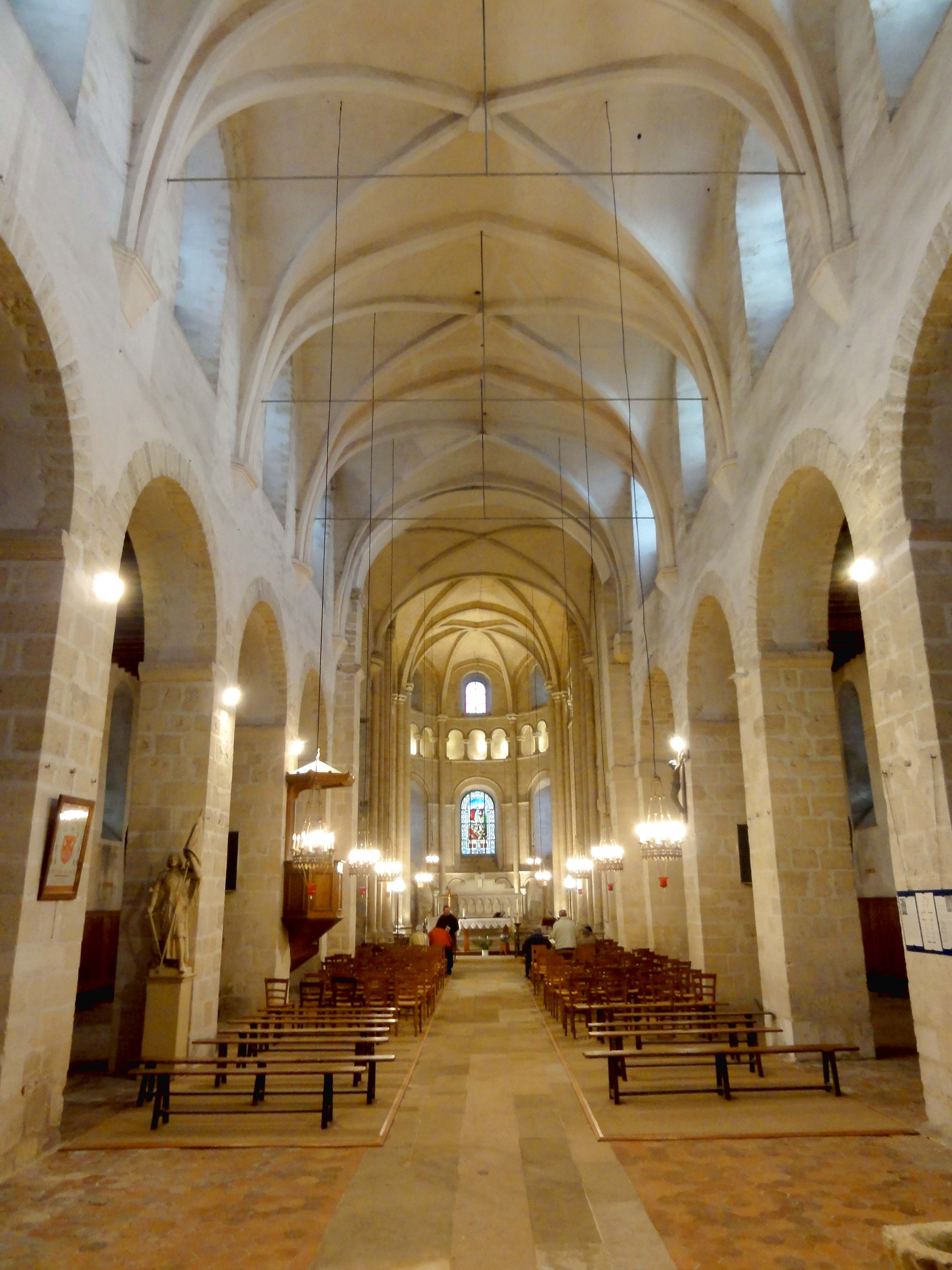 Intérieur de l'église - voir titre.